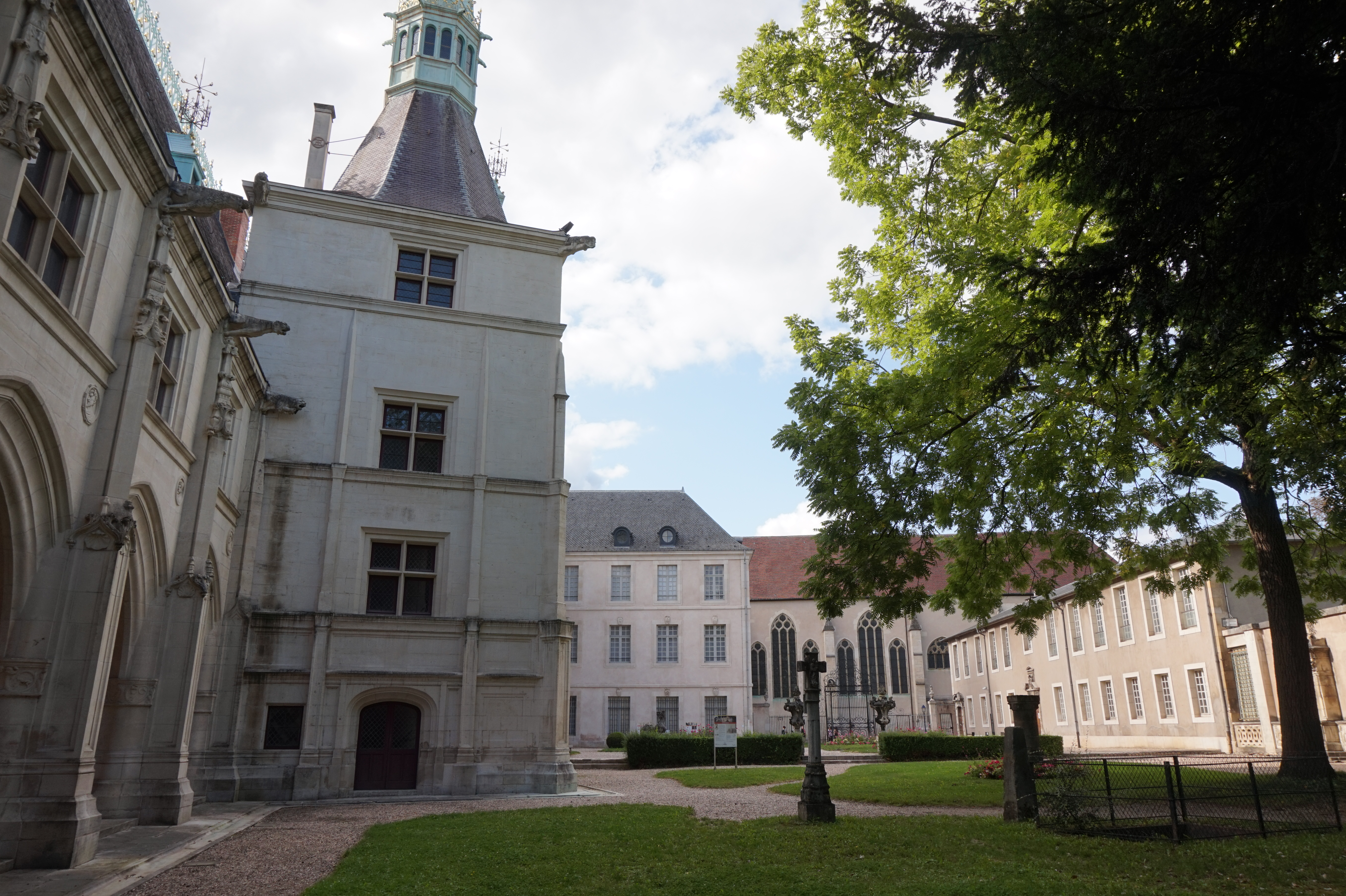 Musée lorrain, cour, vue générale